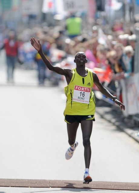 Daniel Rono during Rotterdam Marathon 2008